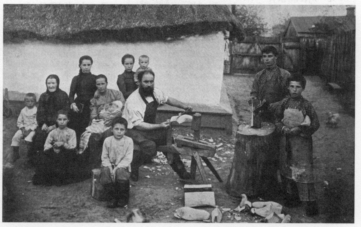 Типичная крестьянская семья штундо-баптистстов Киевской губернии, 1901